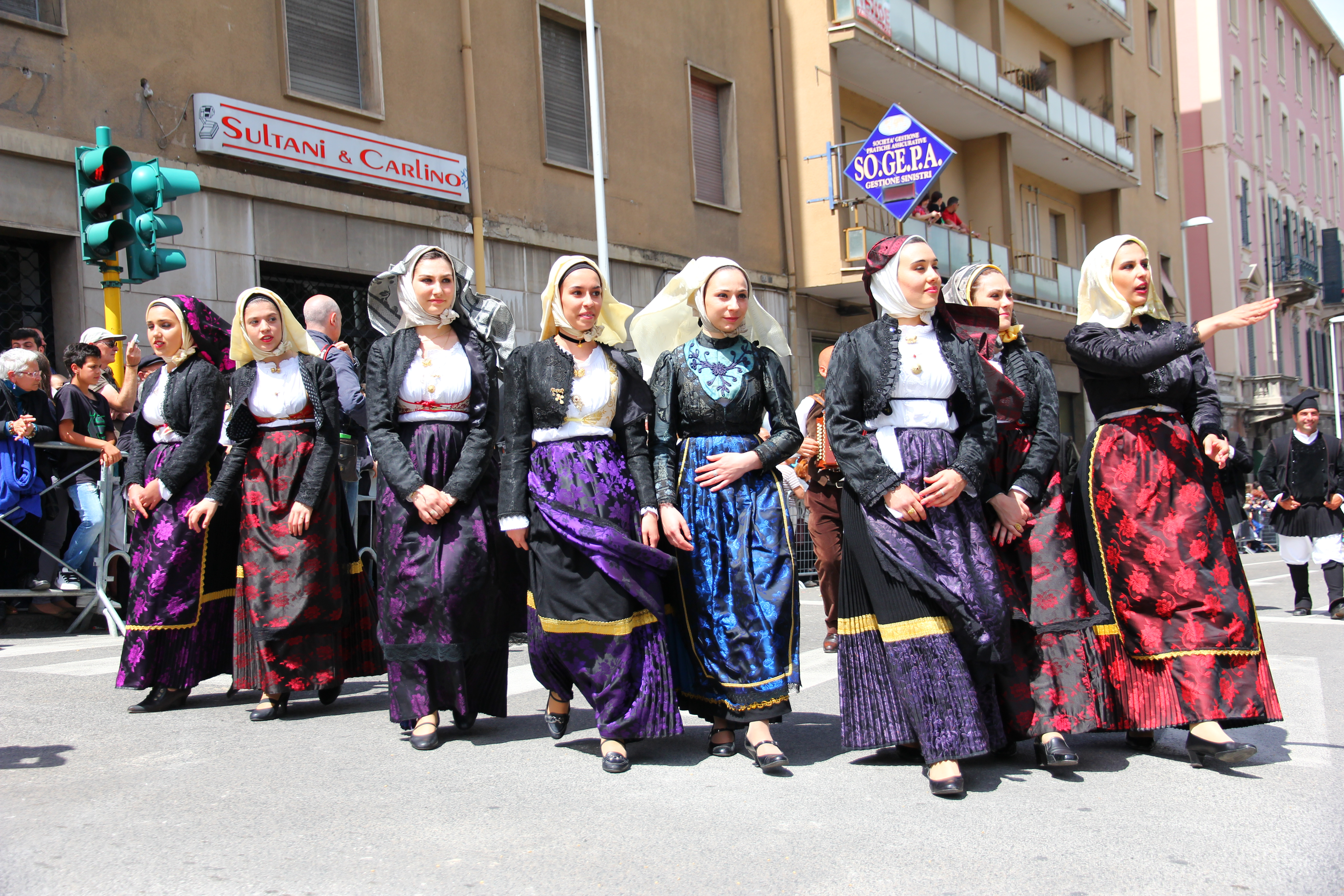 Cavalcata Sarda 2013 (Sassari)